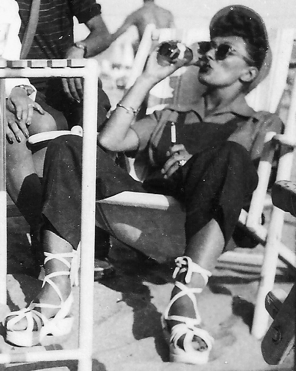 The New Look. Détail de File:Pause tournage Fandango.jpg